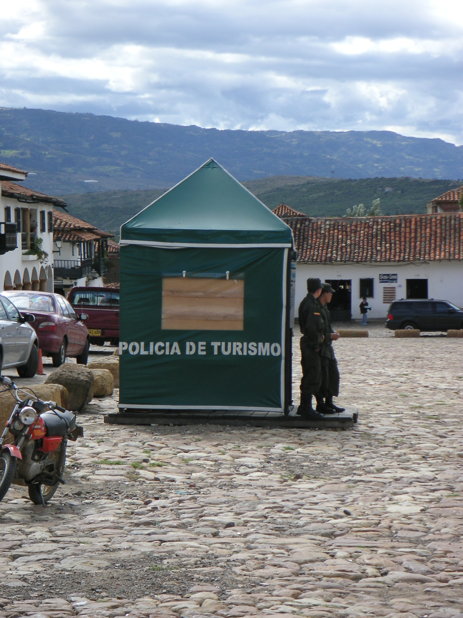 Description: Tourist Police, Villa de Leyva, Colombia Source: Louise Wolff (darina), June 2005